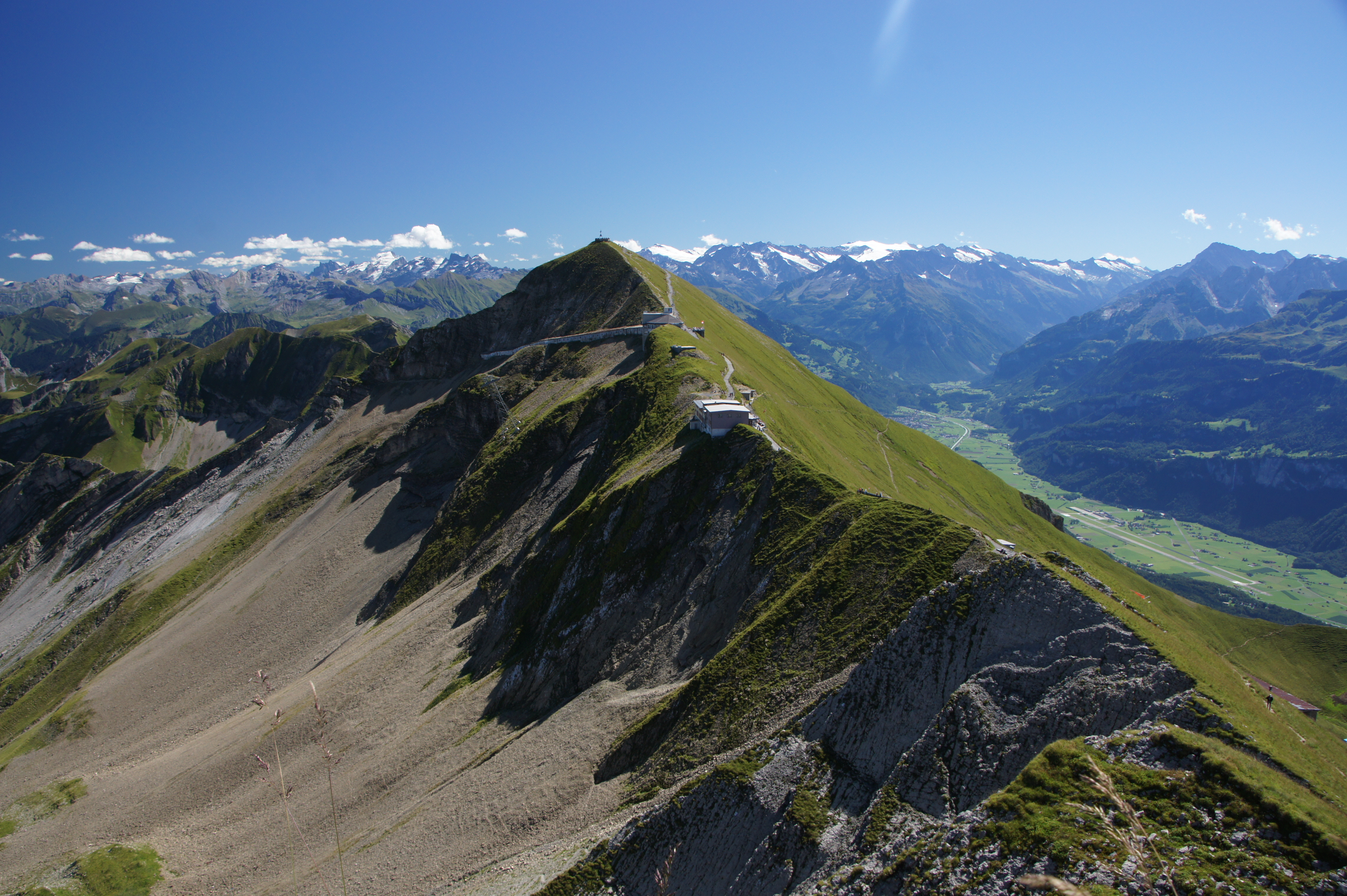 Brienzer Rothorn